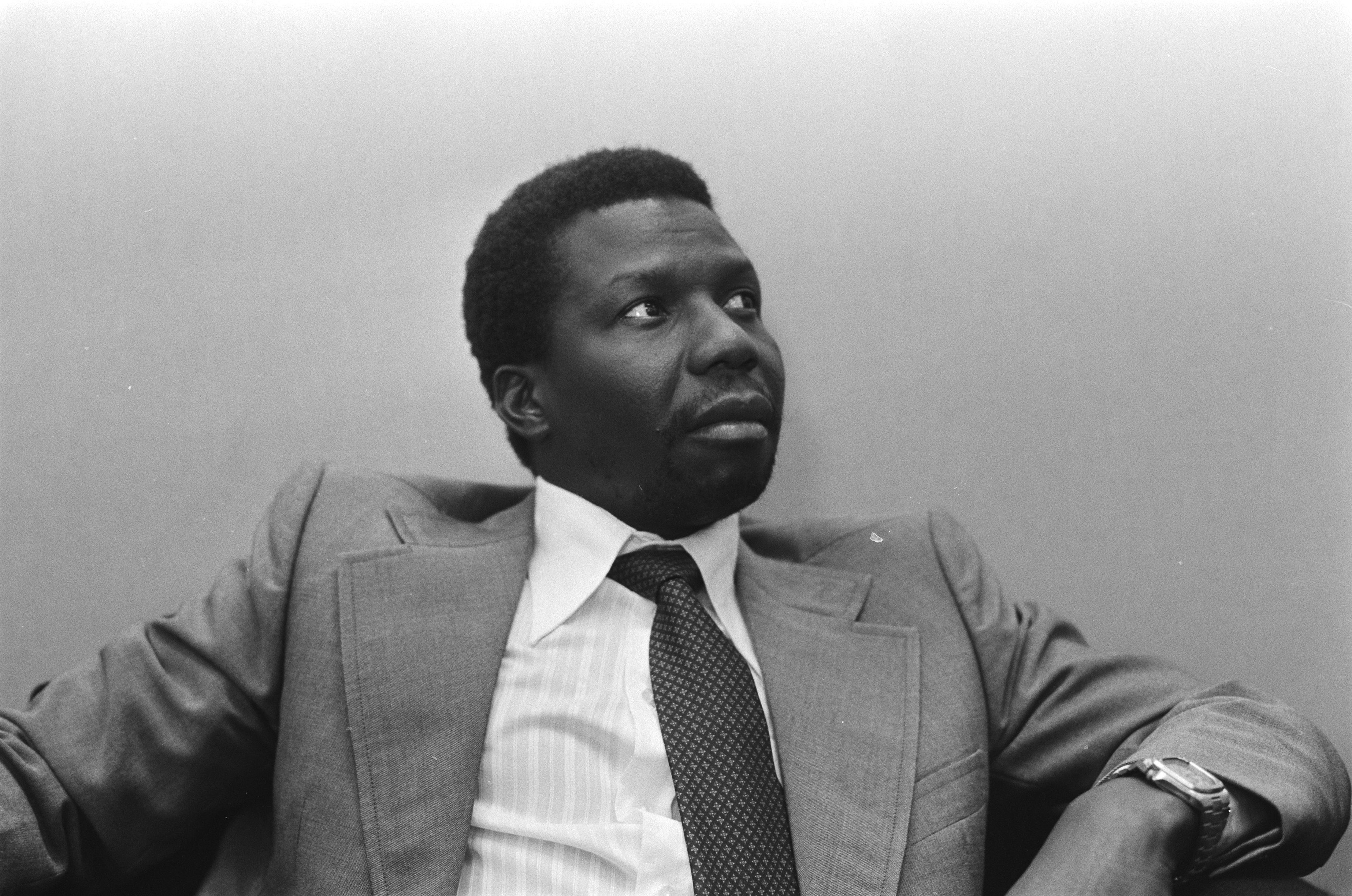 Collectie / Archief : Fotocollectie Anefo Reportage / Serie : [ onbekend ] Beschrijving : Guine Bissau , Premier Joao Bernardo Vieira (kop) Datum : 29 september 1980 Locatie : Guinee Bissau Trefwoorden : ministers-presidenten Persoonsnaam : Vieira, Joao Bernardo Fotograaf : Bogaerts, Rob / Anefo Auteursrechthebbende : Nationaal Archief Materiaalsoort : Negatief (zwart/wit) Nummer archiefinventaris : bekijk toegang 2.24.01.05 Bestanddeelnummer : 931-0498